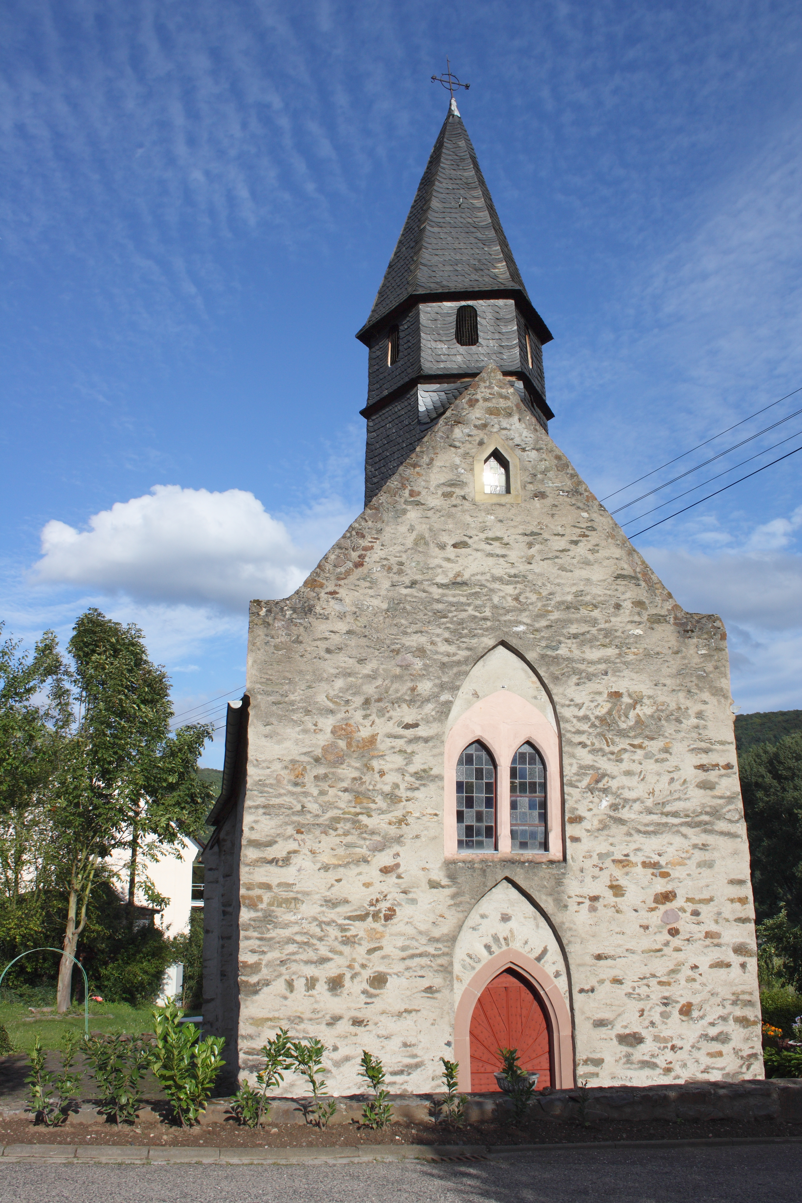 Peterskapelle in Spay